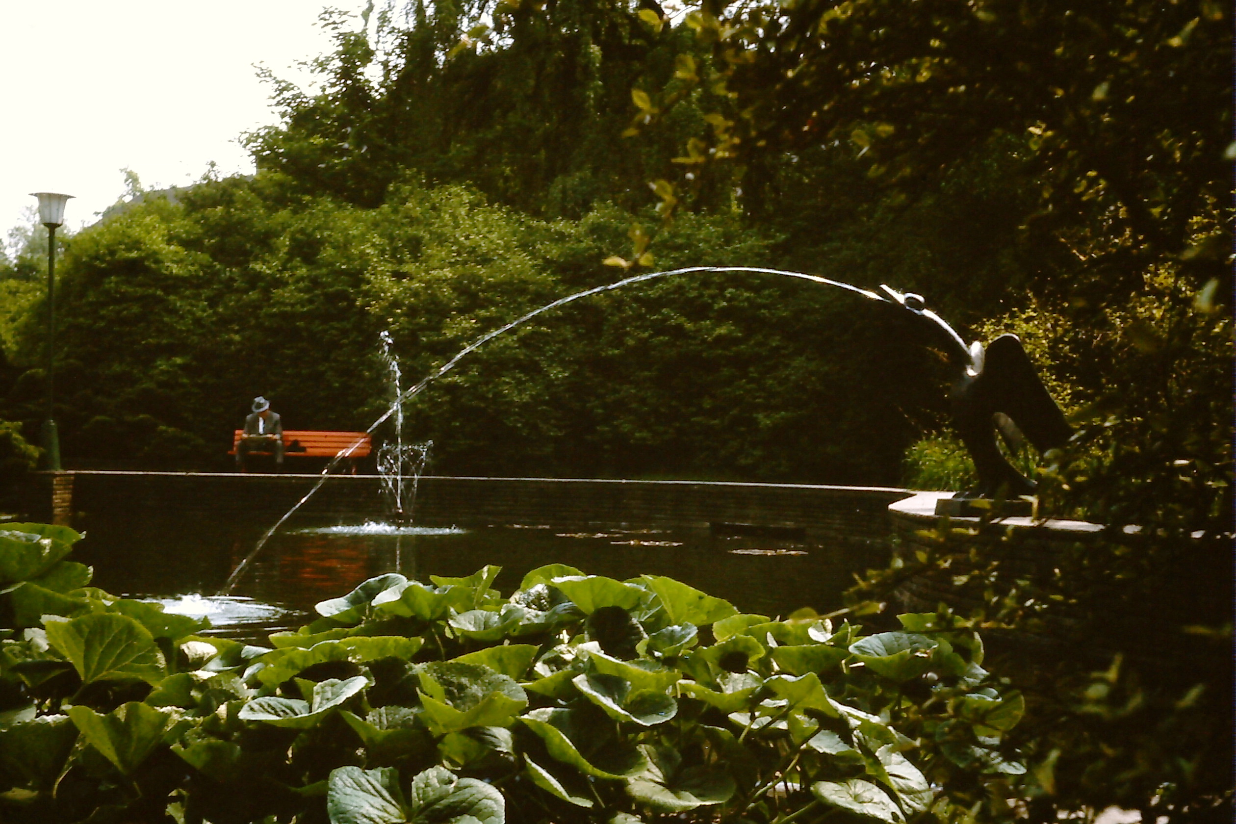 Brunnen im Stadtpark Bochum (um 1980)